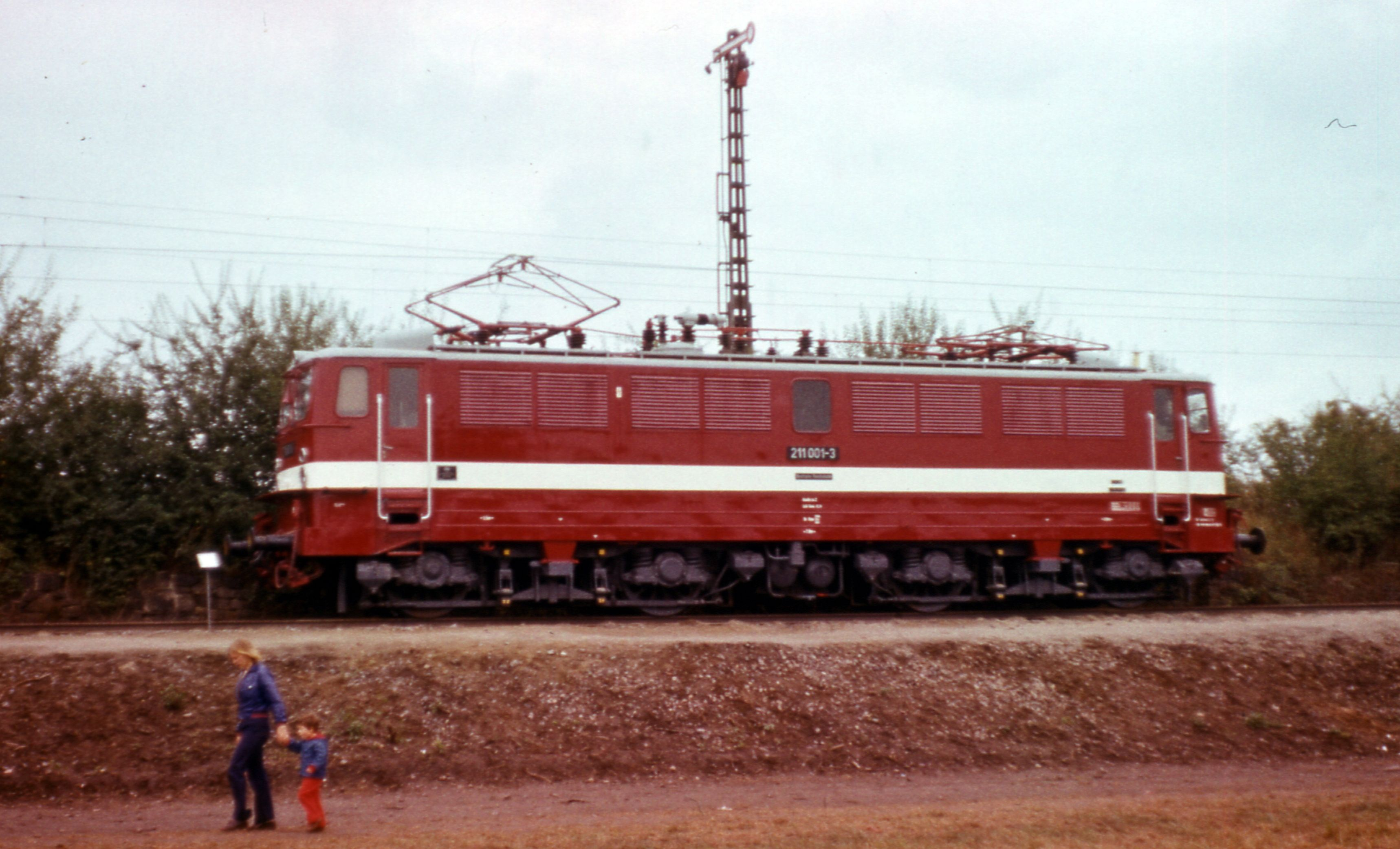 Dessau Süd, 211 001 (Prototyp), Fahrzeugausstellung »100 Jahre elektrische Lokomotiven«. Die Maschinen stehen auf dem Probefahrgleis des Raw Dessau